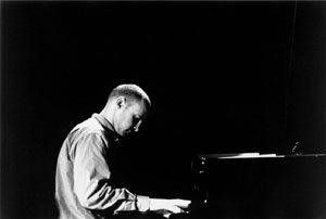 Erik van der Luijt op piano, foto: Onno Voorhoeve, eigen beheer, bron: Erik van der Luijt